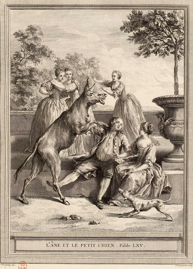 Gravure réalisée par Jacques Firmin Beauvarlet d'après un dessin de Jean-Baptiste Oudry représentant la fable L'âne et le petit chien de Jean de La Fontaine (fable 5 du livre IV). Cette gravure est parue dans l'édition complète des fables de La Fontaine, parue en quatre tomes chez l'éditeur Desaint & Saillant, rue saint Jean de Beauvais à Paris, 1755-1759.